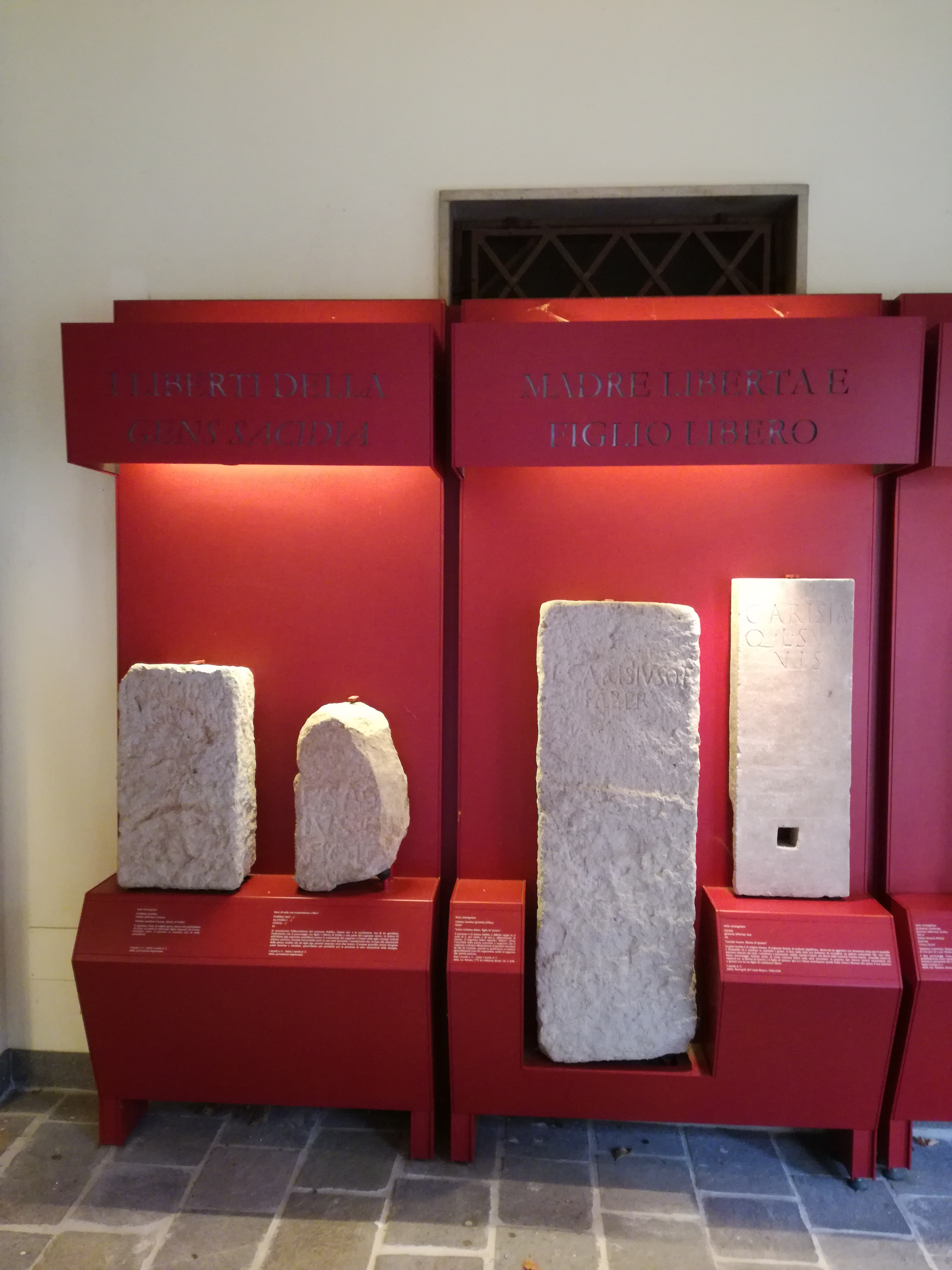 Lapidi del Museo Archeologico Nazionale di Adria - Madre liberta e figlio libero